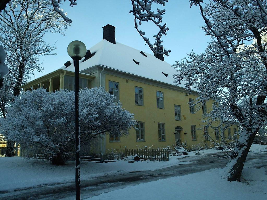 Spinnhuset vid Svingeln i Göteborg, den 20 december 2004. En bild tagen av Harri Blomberg.